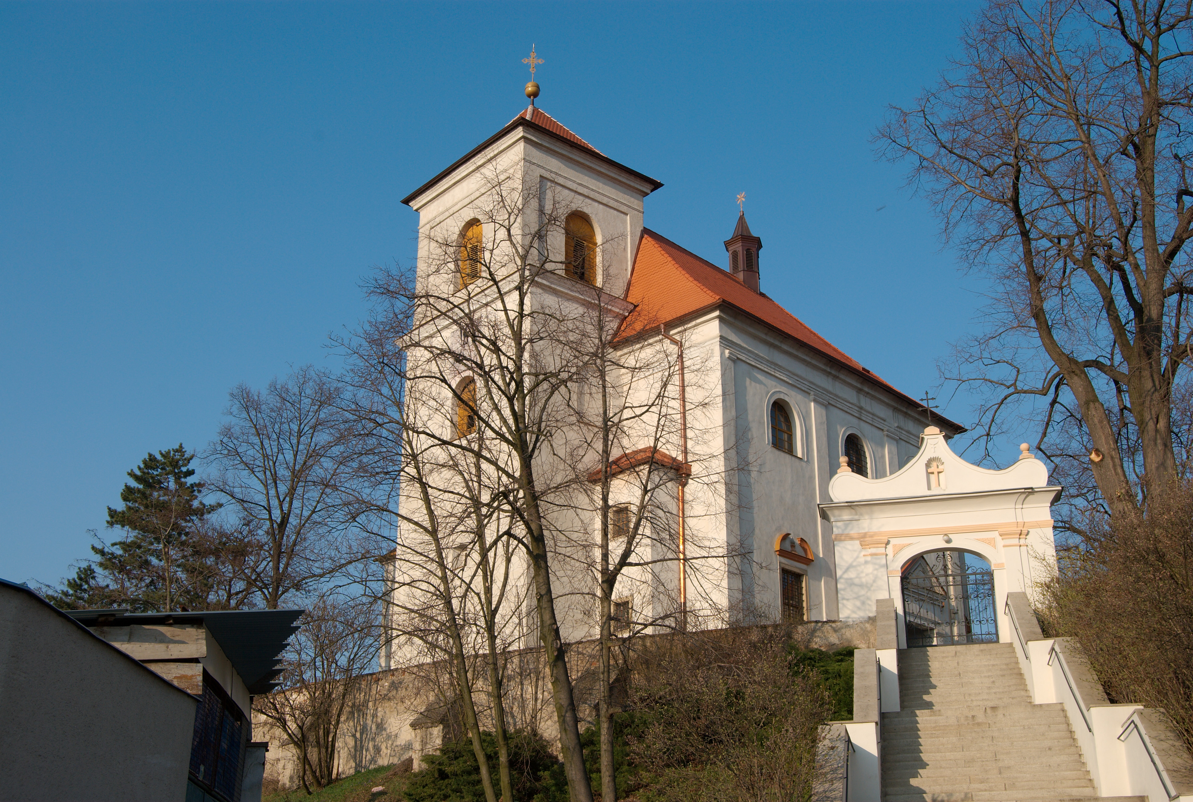 Brno-Obřany - Kostel svatého Václava